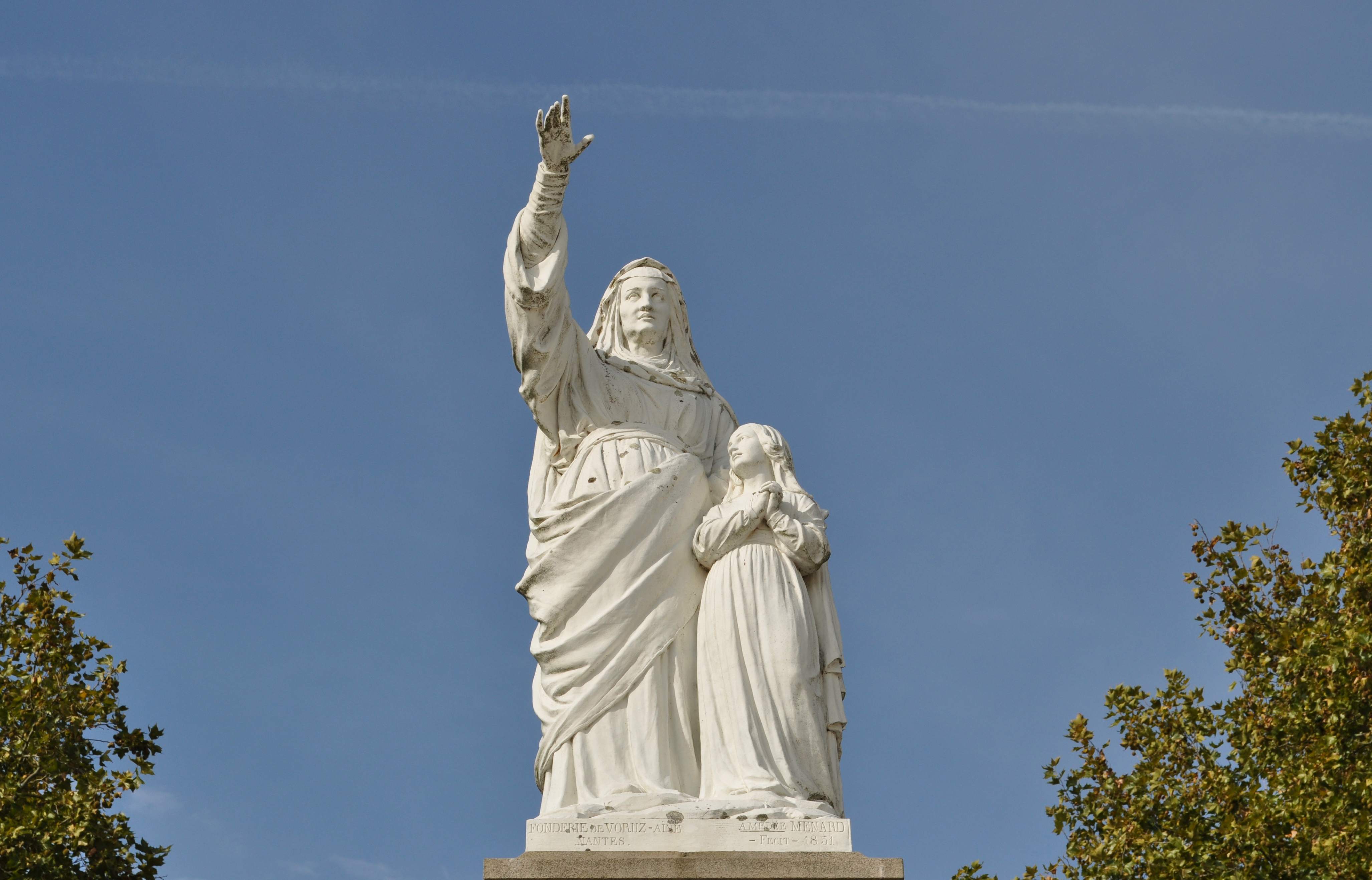 Delwenn Santez Anna e Naoned.